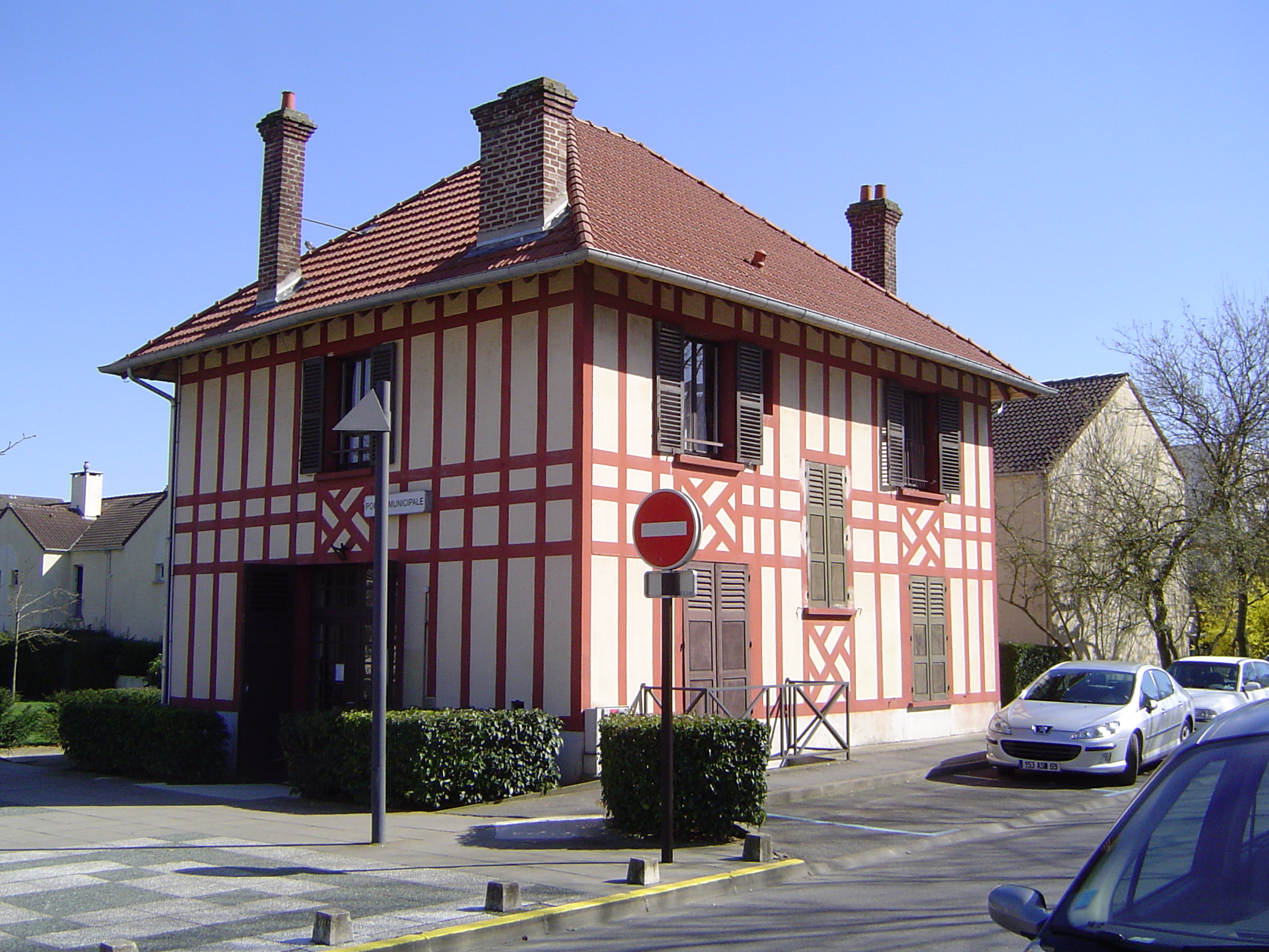 Photos prises à Lognes, commune française de Seine-et-Marne